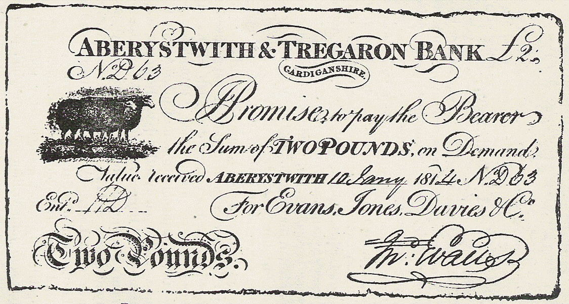 Banc y Ddafad Ddu, dwy bunt